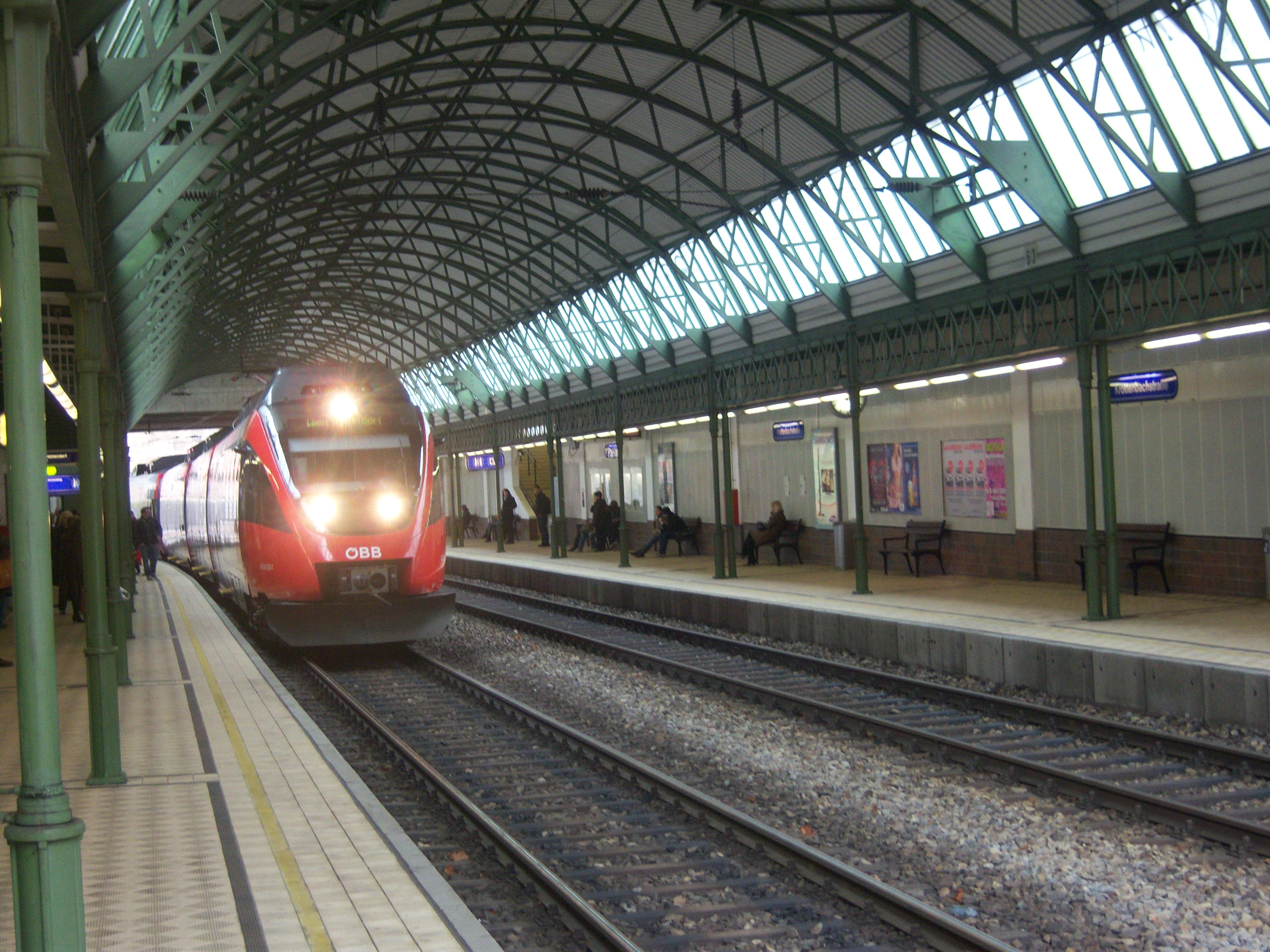 Bahnhof Wien Krottenbachstraße